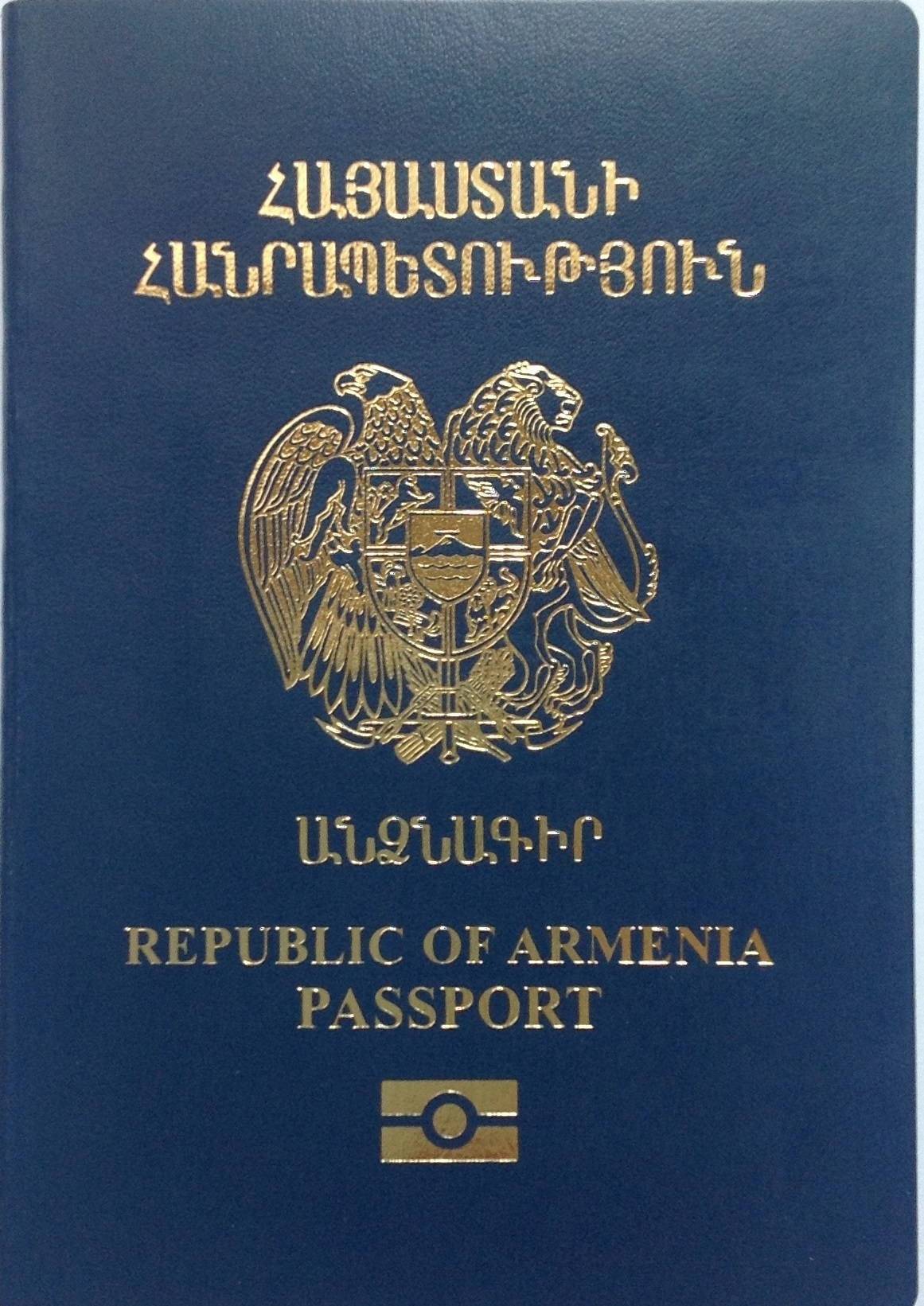 frontbildo de la moderna armena pasporto.